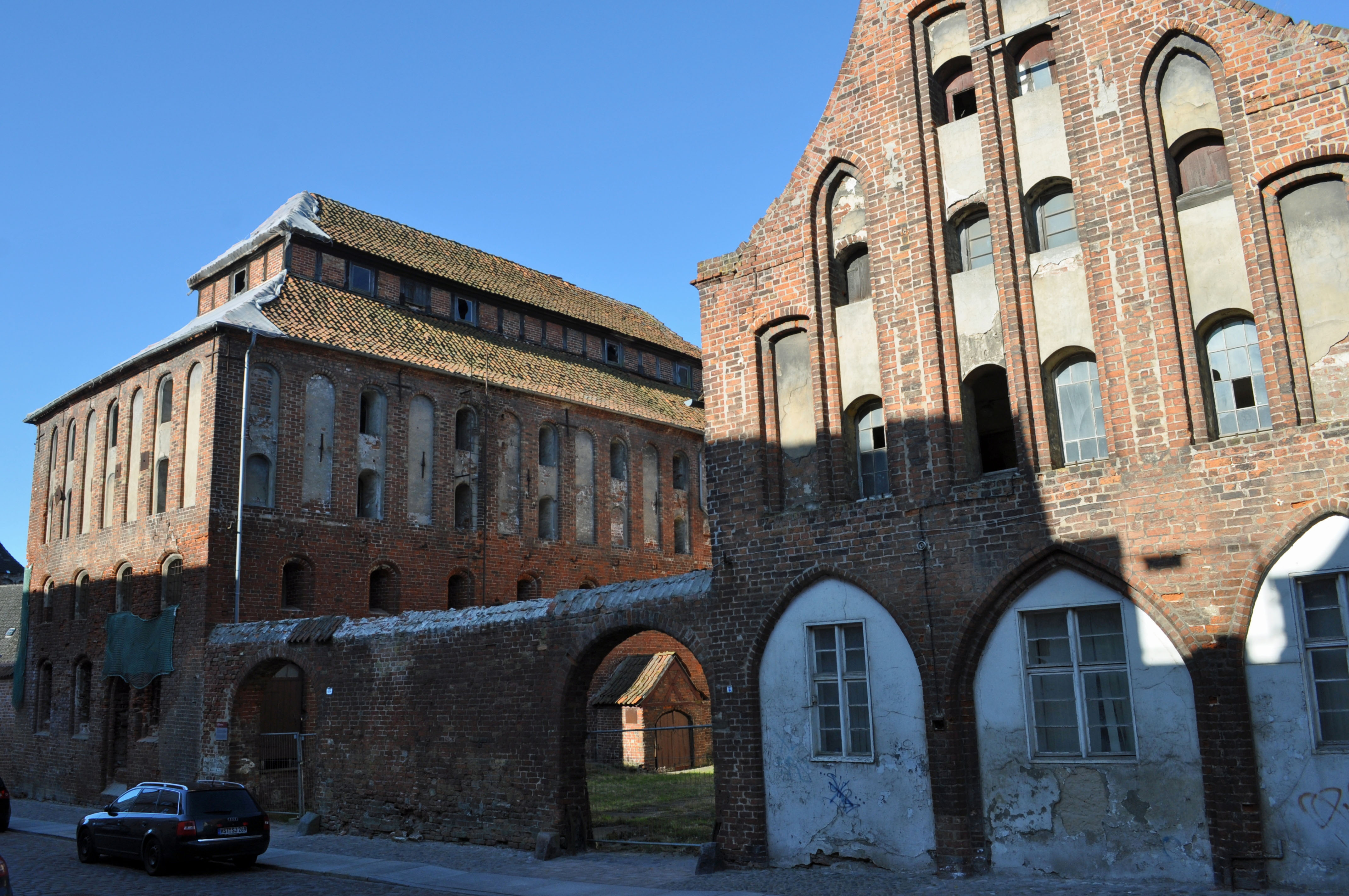 Gebäude bzw. Gebäudedetail in Stralsund. Straße und Hausnummer siehe Dateiname.